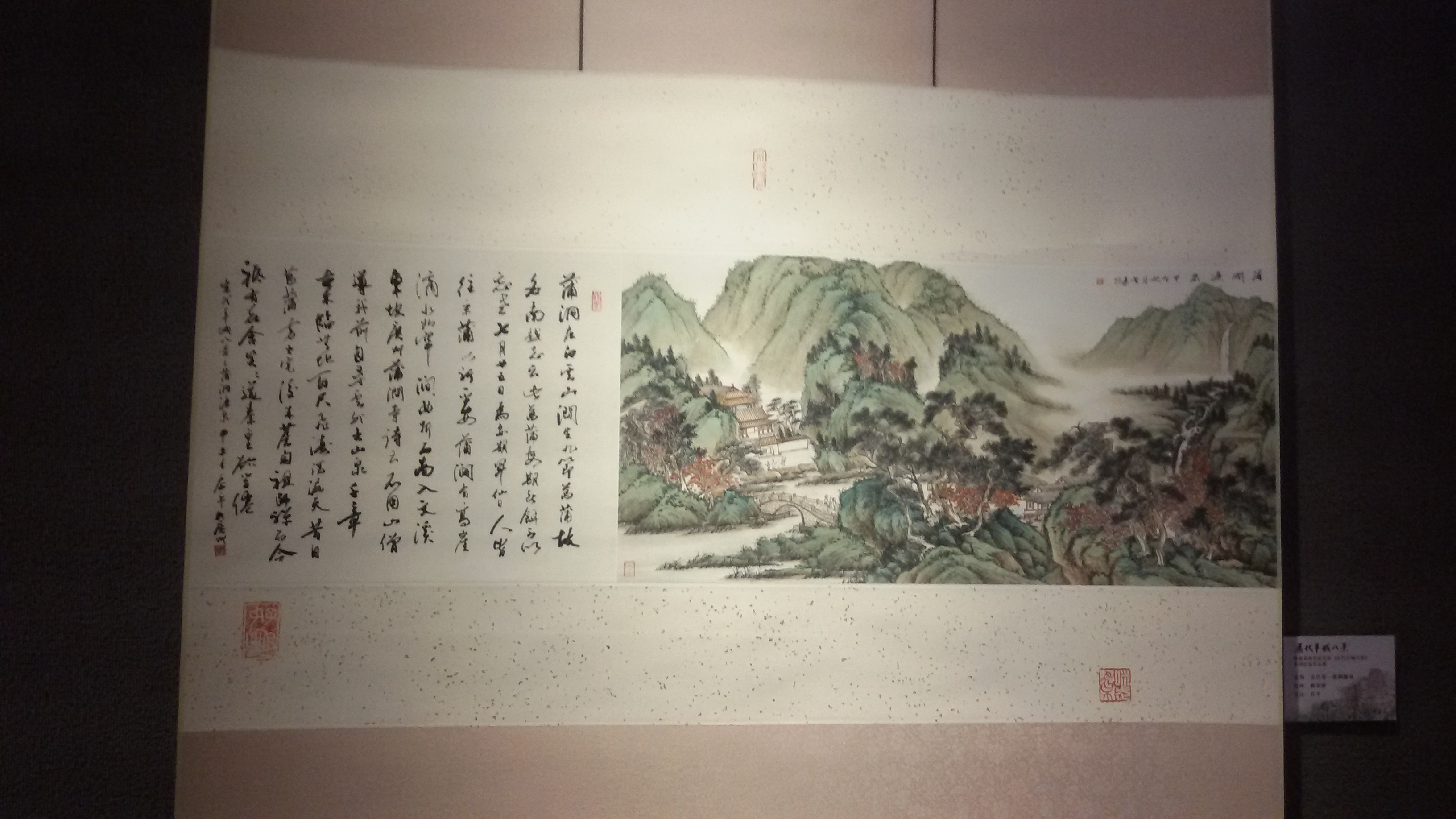 粵語: 同蒲澗濂泉有關嘅古仔